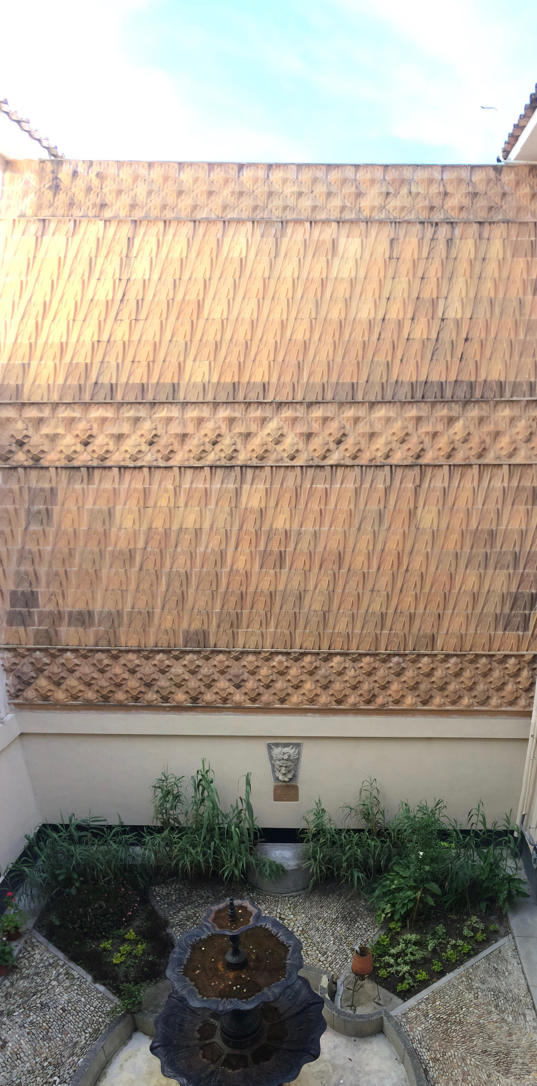 Patio de la Casa Consistorial de Sonsón; al fondo, mural de Pablo Jaramillo.